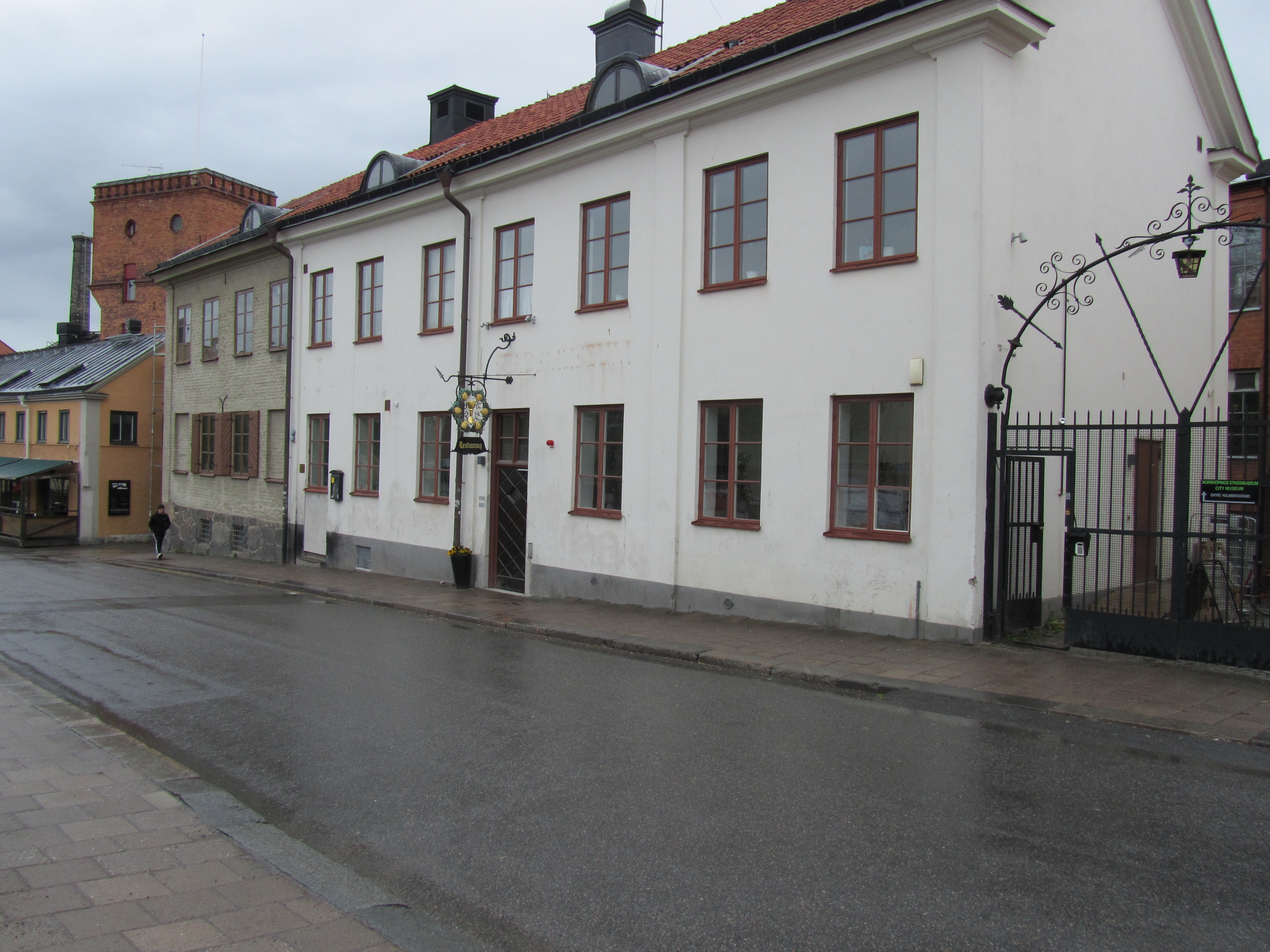 Knäppingen in Norrköping